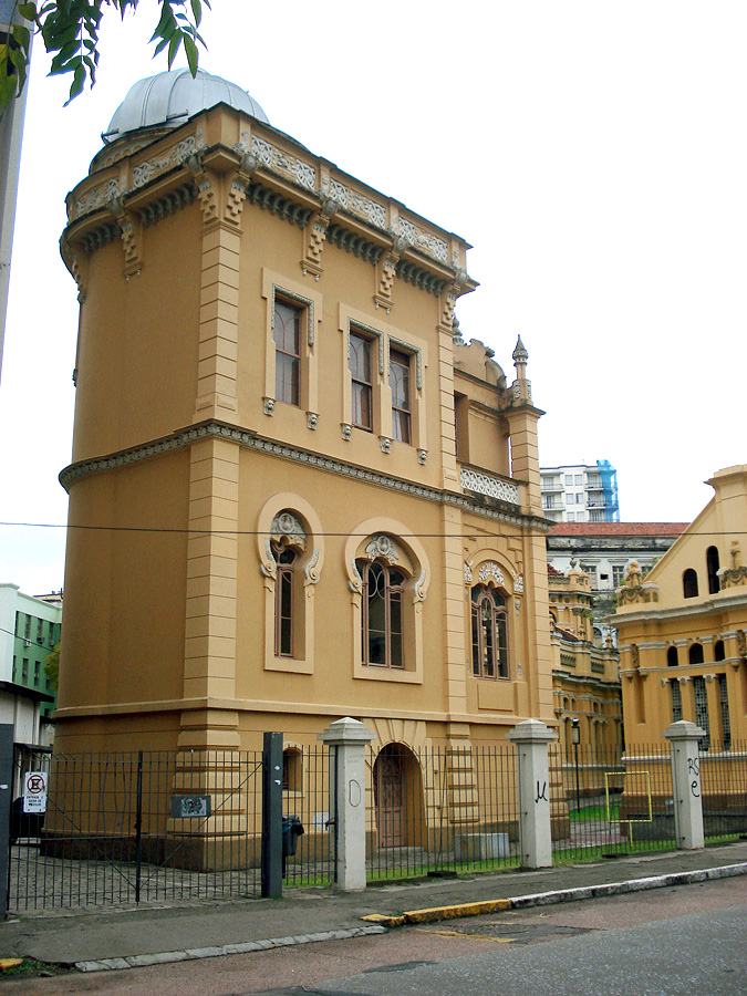 Observatório Astronômico, um prédio histórico da Universidade Federal do Rio Grande do Sul, Porto Alegre, Brasil.